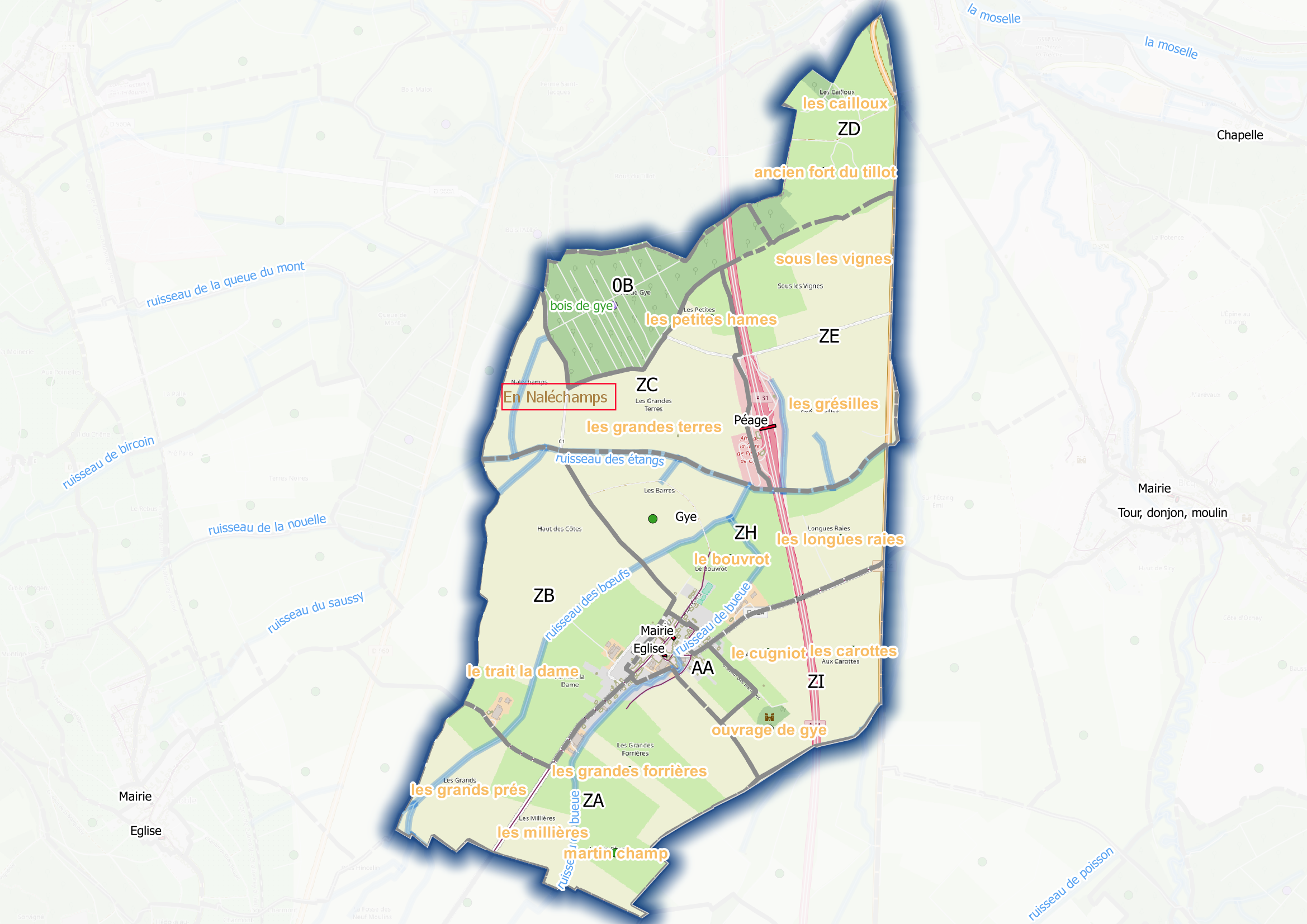 Gye (Ban communal) - Qgis et Open StreetMap